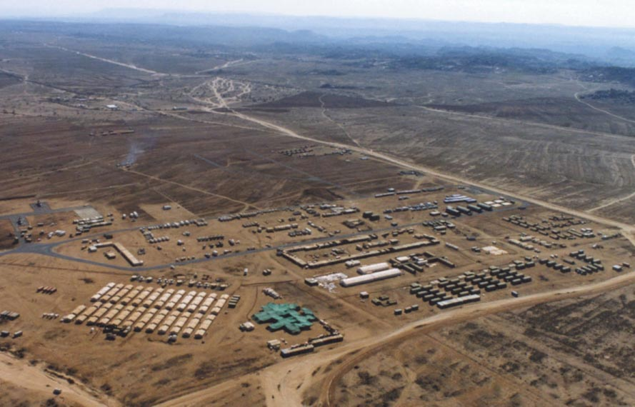 NECBAT, de logistieke basis in Dekemhare, waar ook het helikopterdetachement, het contingentscommando en het veldhospitaal zijn gehuisvest.